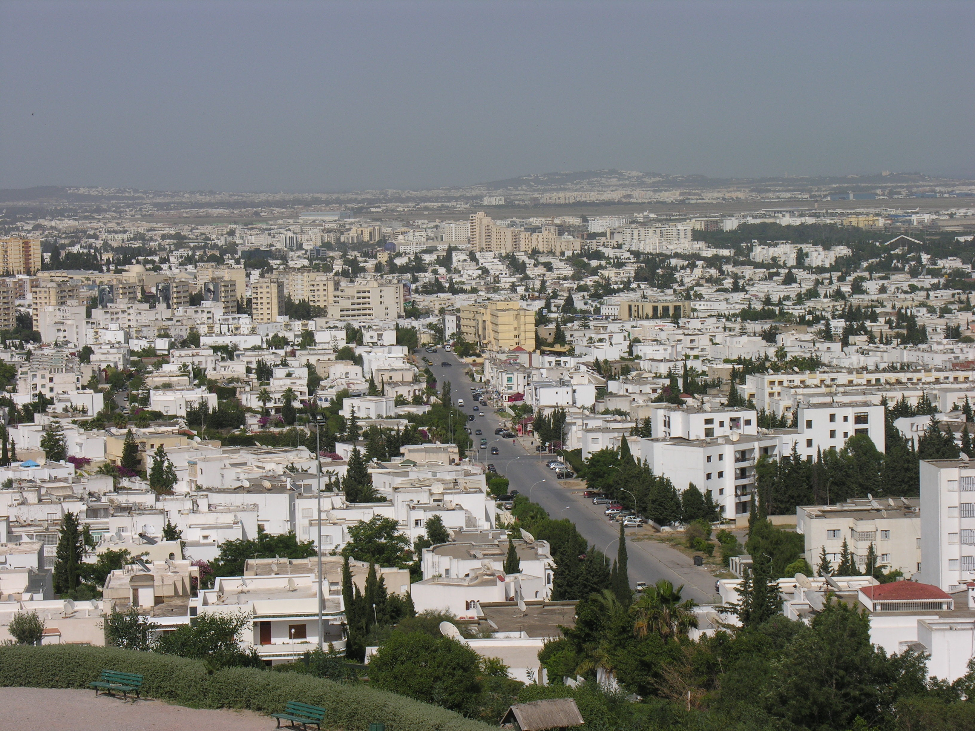 Les quartiers d'El Menzah et d'El Manar dans la banlieue nord de Tunis. En haut et dans la zone verte, on voit l'aéroport de Tunis-Carthage entourée par les quartiers d'El Aouina et La Soukra. Au fond de la photo, on aperçoit, de gauche à droite, les collines de Ghammarth, La Marsa-Sidi Bou Said et de Carthage. Au milieu, on aperçoit l'avenue qui mène d'El Menzah VI à El Manar.